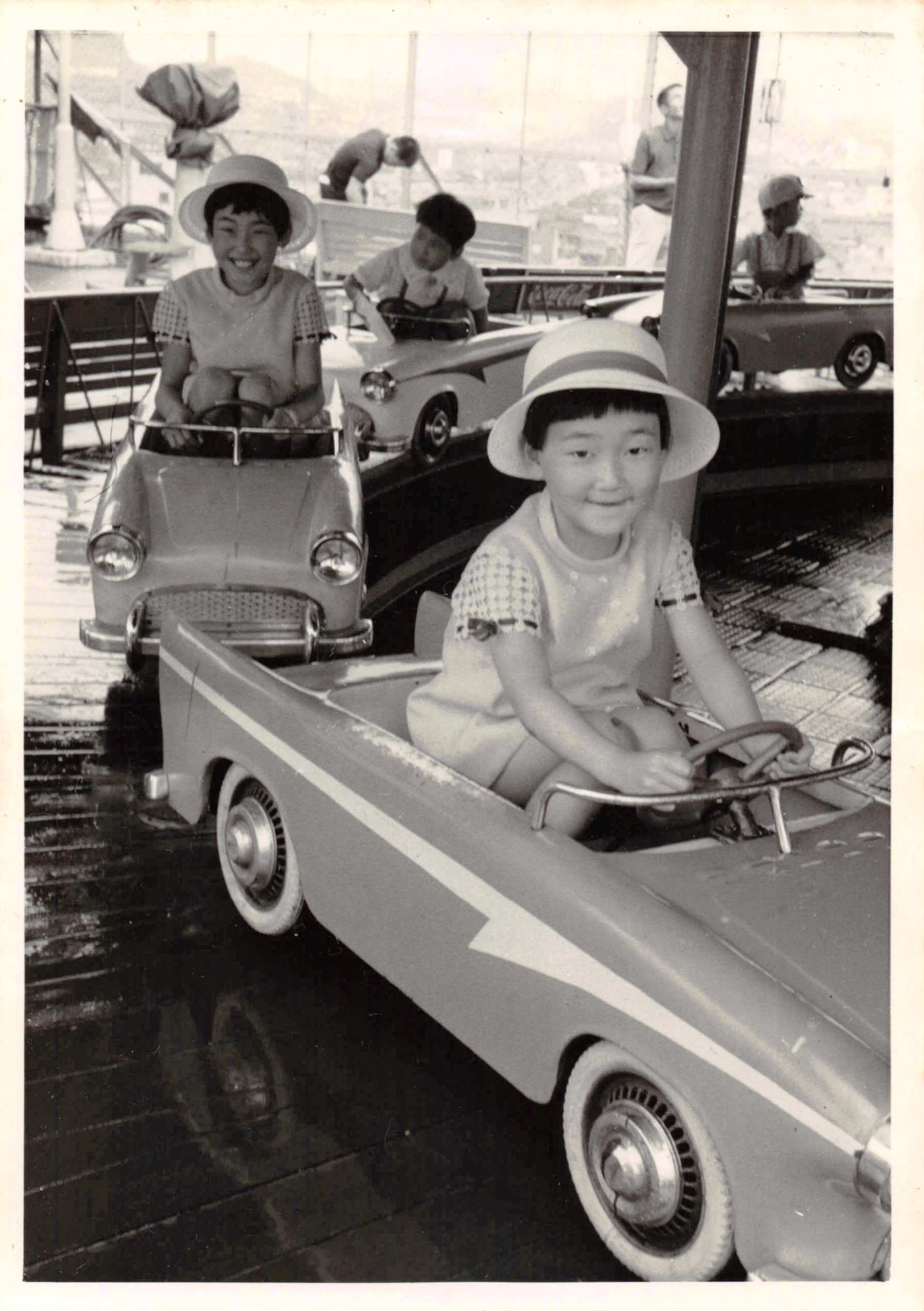 スキャン時に白い線などが目立っていた為、修正しました。